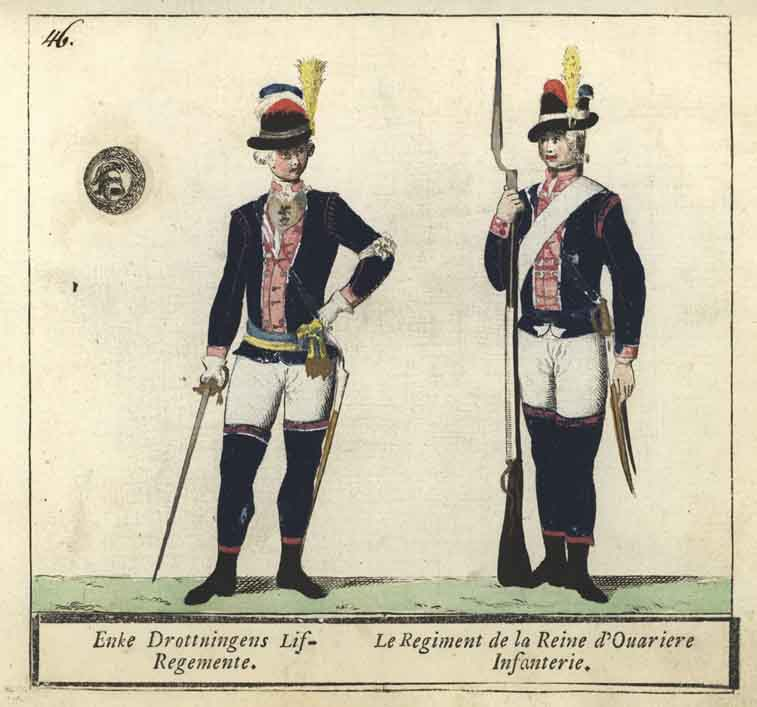 Änkedrottningens livregementes uniform m/1779, ur C. G. Roos samling.